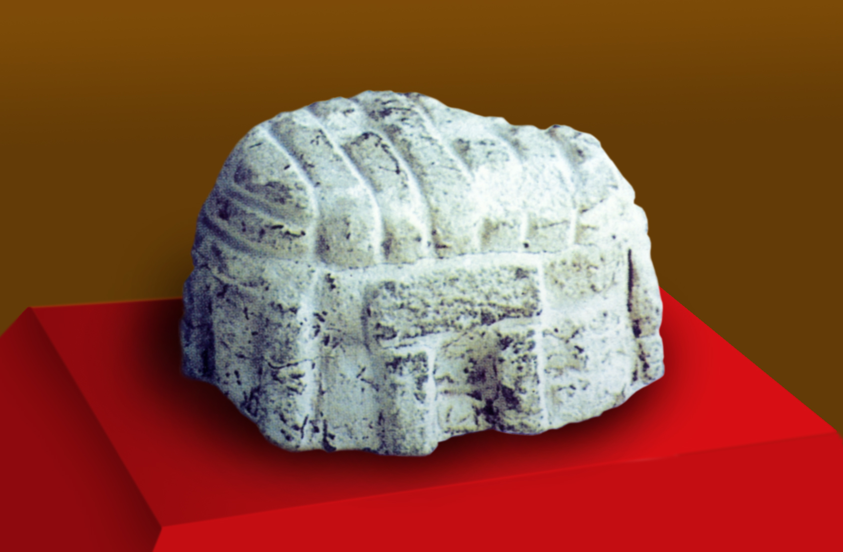 Modèle de temple mégalithique découvert lors des fouilles de Ta' Hagrat (dimensions : 6 x 4 x 5 cm)